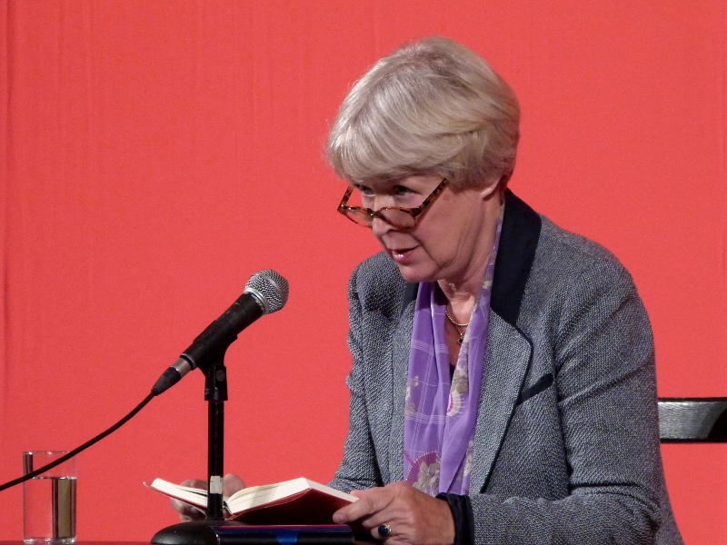 German poet Karin Kiwus, at the Erlanger Poetenfest 2014.